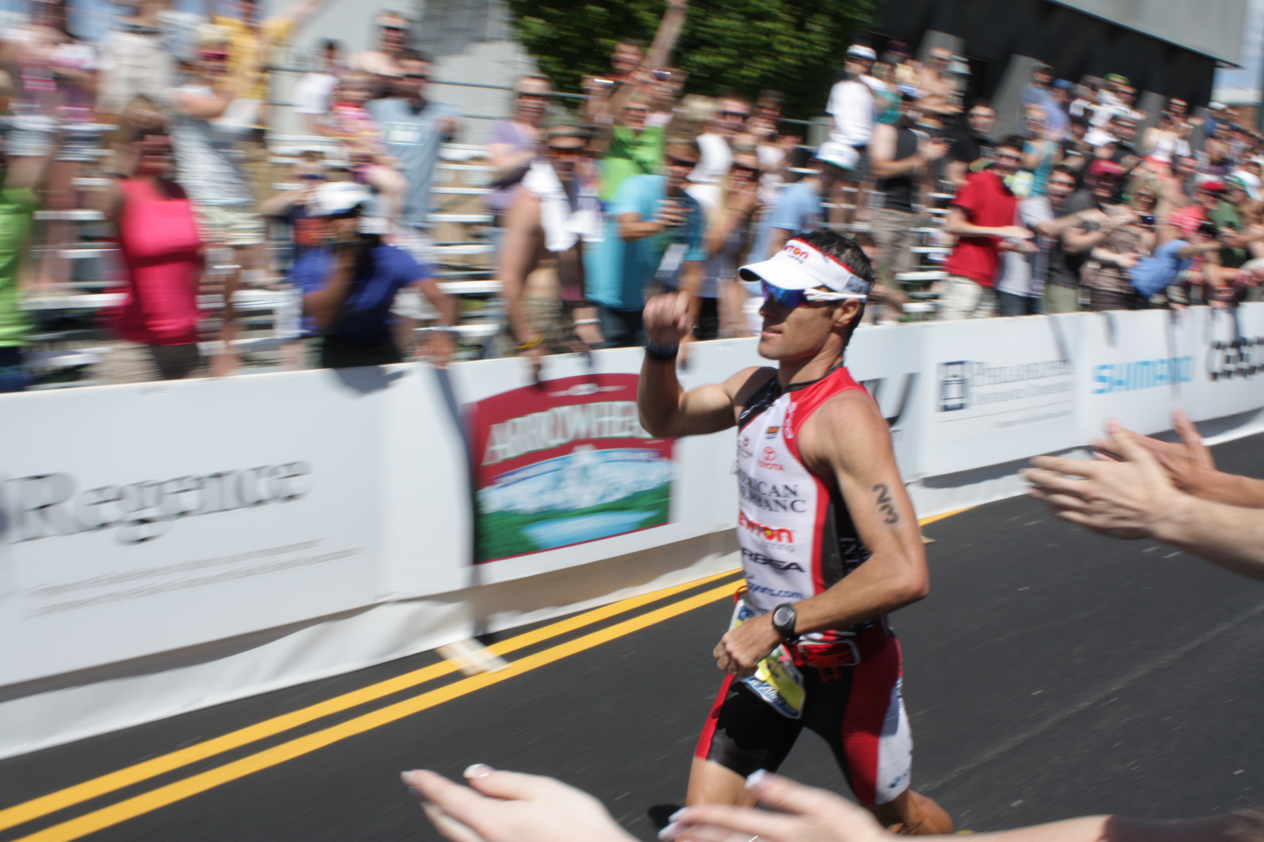 Craig Alexander - 2011 Ford Ironman Cœur d’Alène